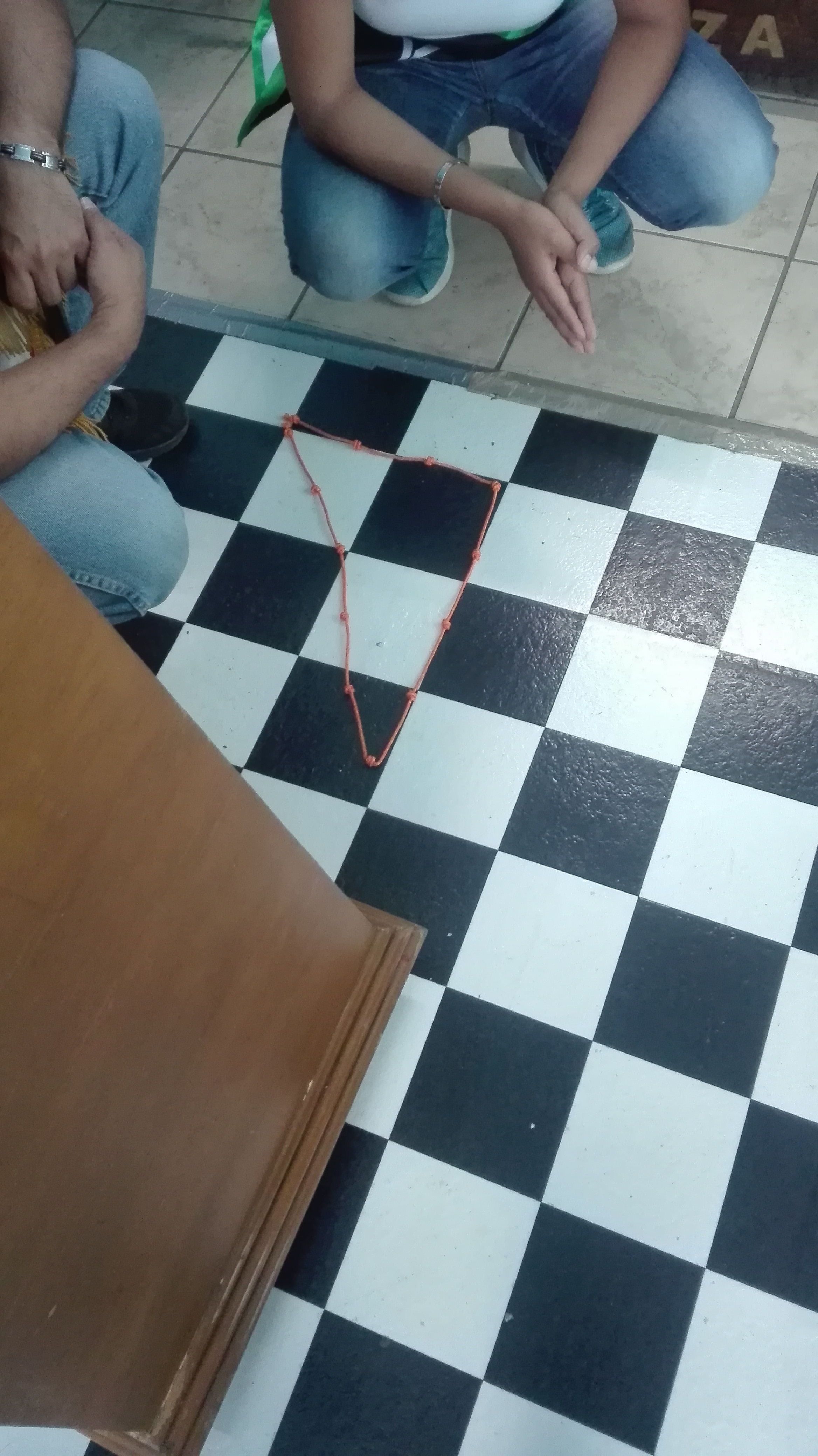 explicación del uso de la cuerda en la masonería